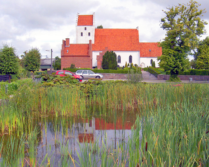 fra syd